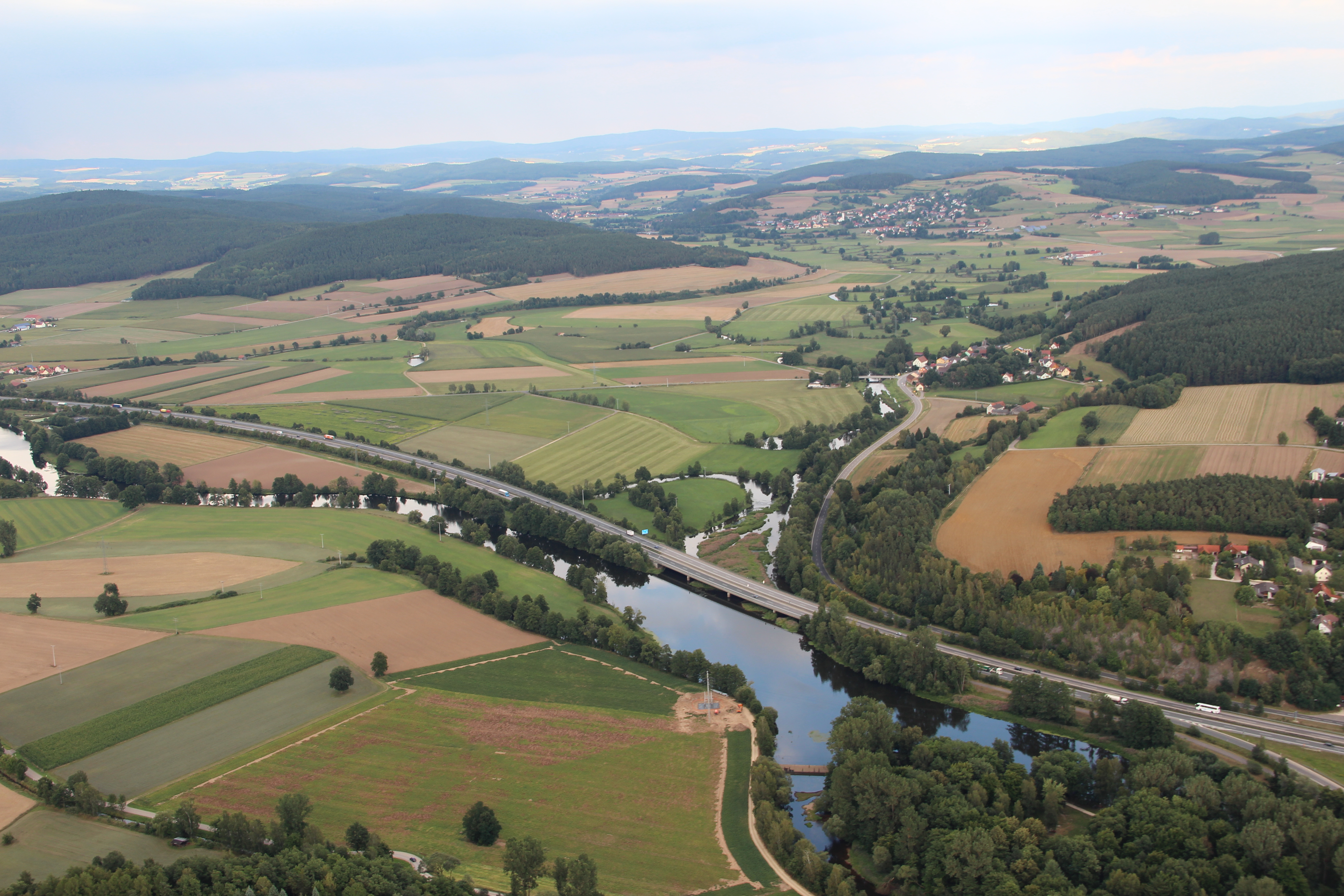 Der Fluss Schwarzach mündet bei Schwarzenfeld in die Naab (von links kommend). Landkreis Schwandorf, Oberpfalz, Bayern (2012)